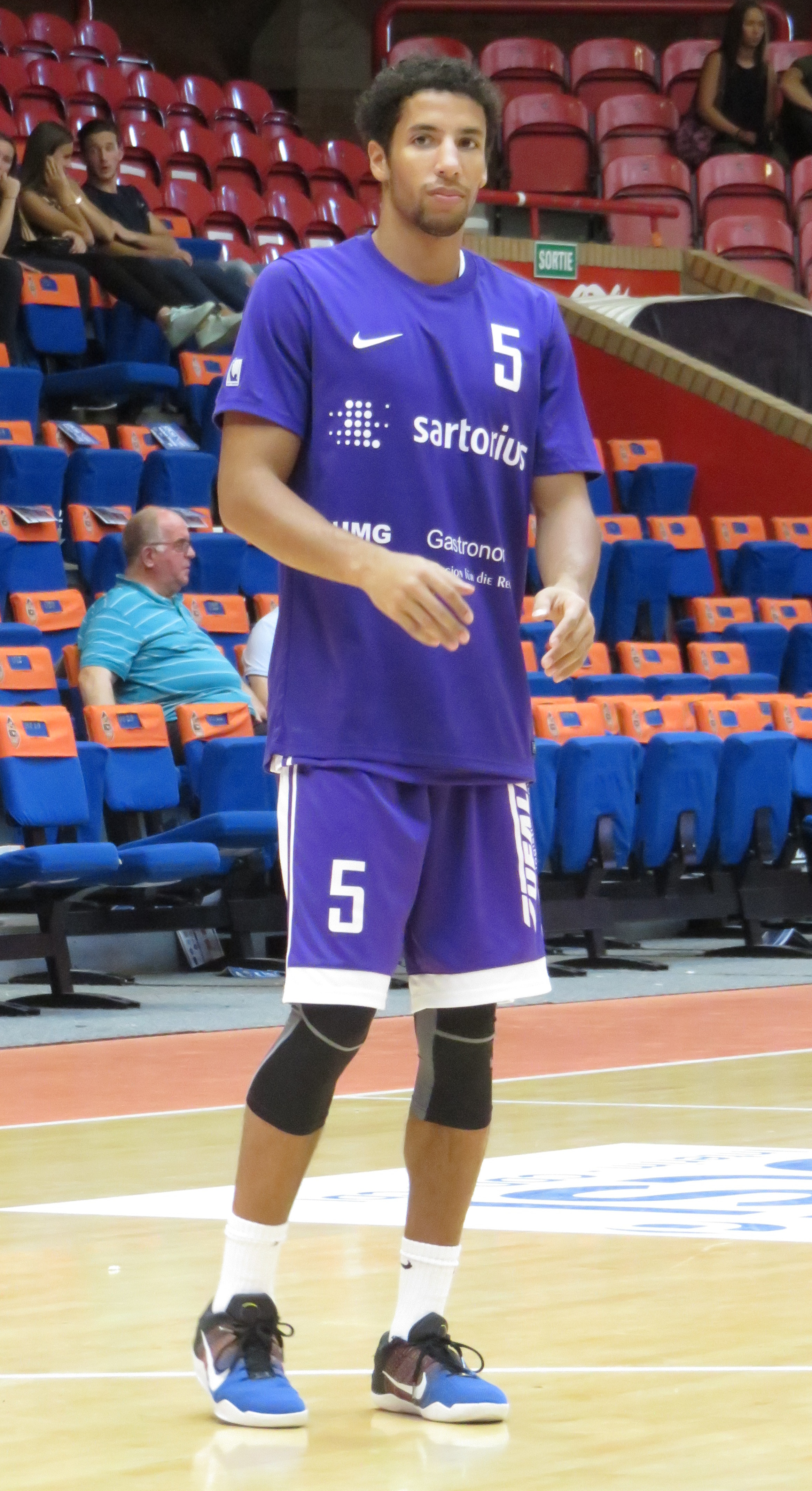 5 Leon Williams